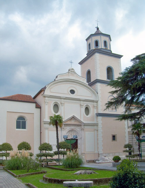 Facciata della Chiesa dell'Annunziata, Sant'Agata de' Goti (BN)